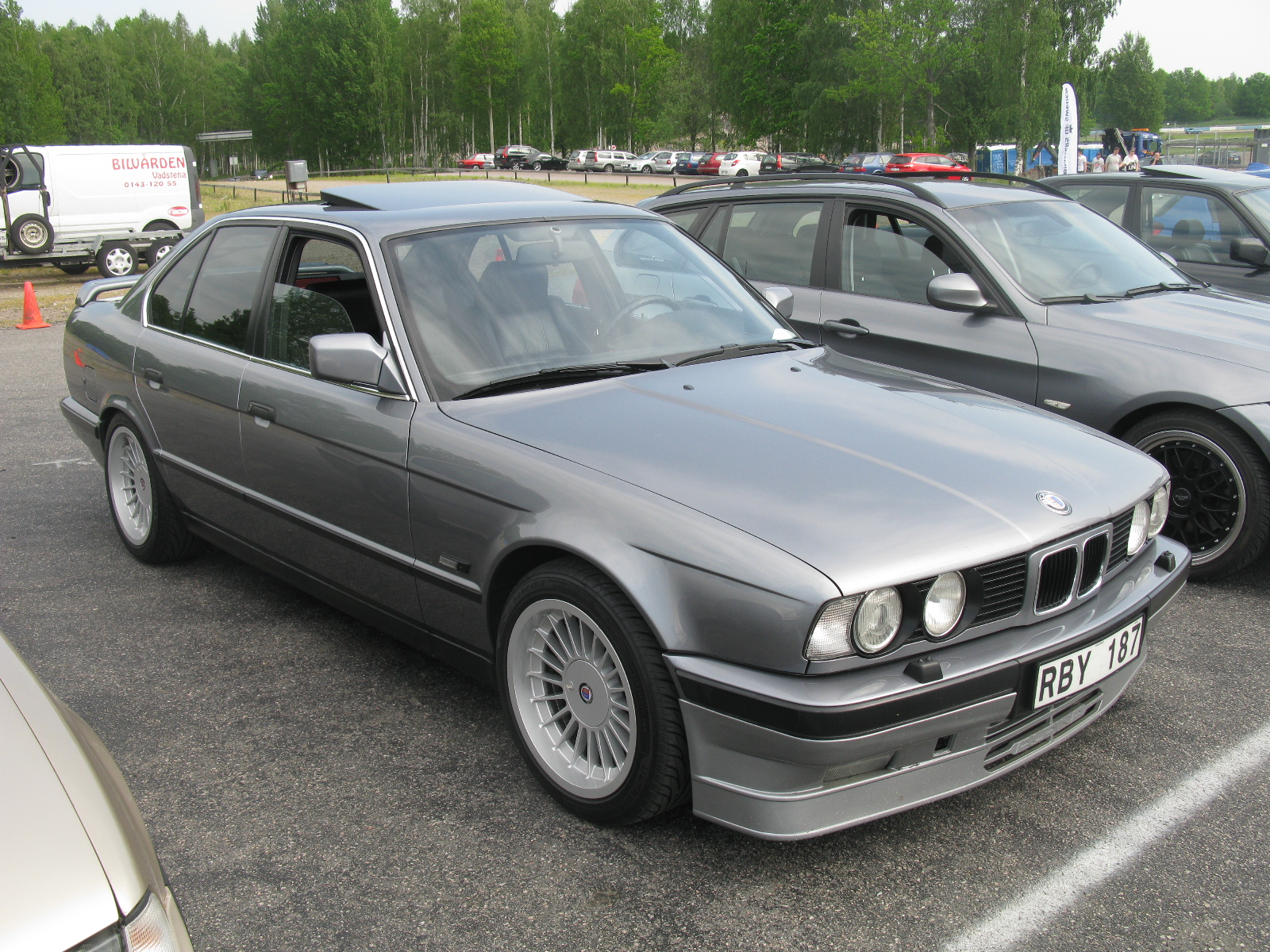 BMW Alpina B10 Biturbo E34